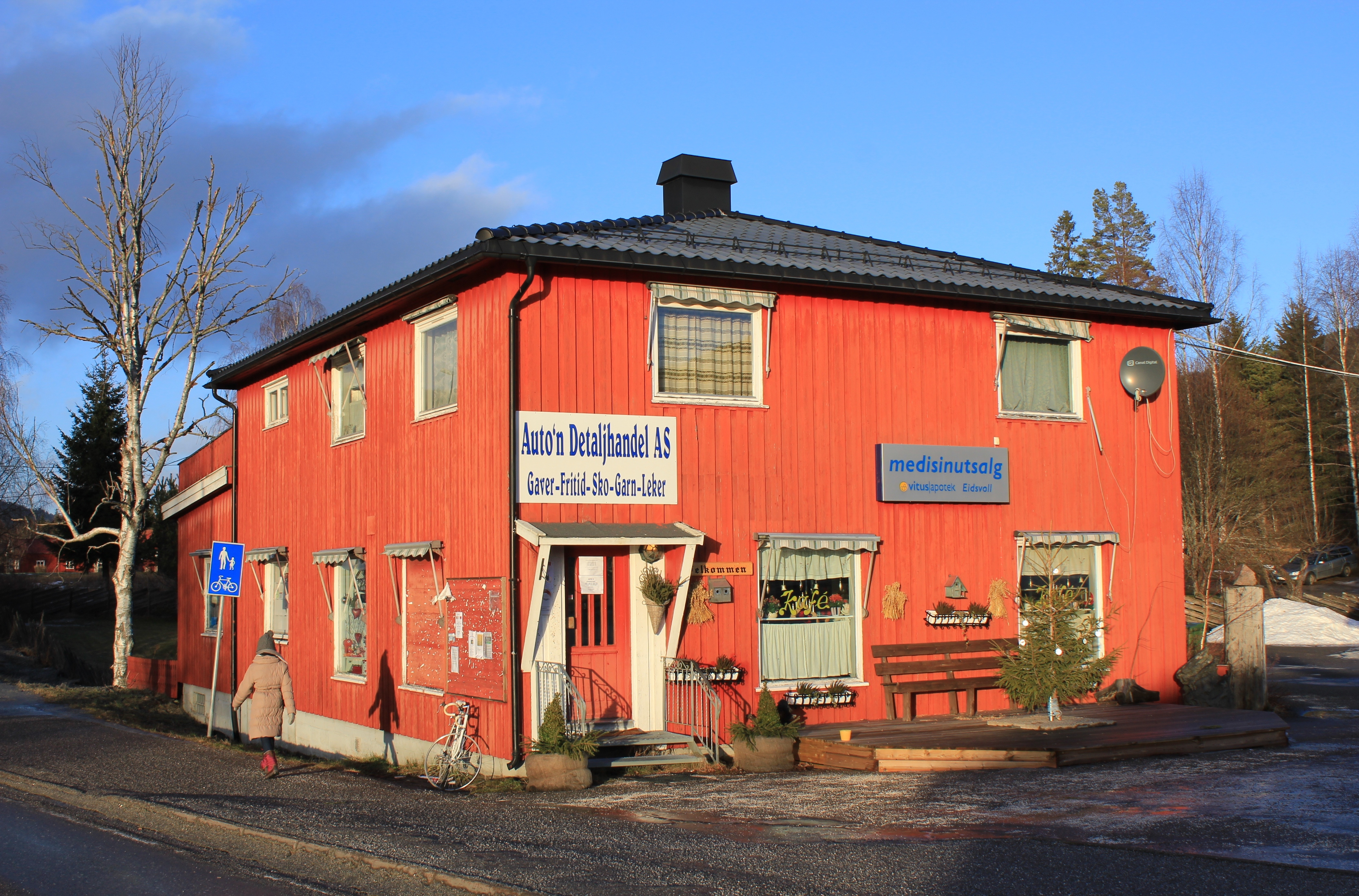 Auto'n detaljhandel i Hurdal.